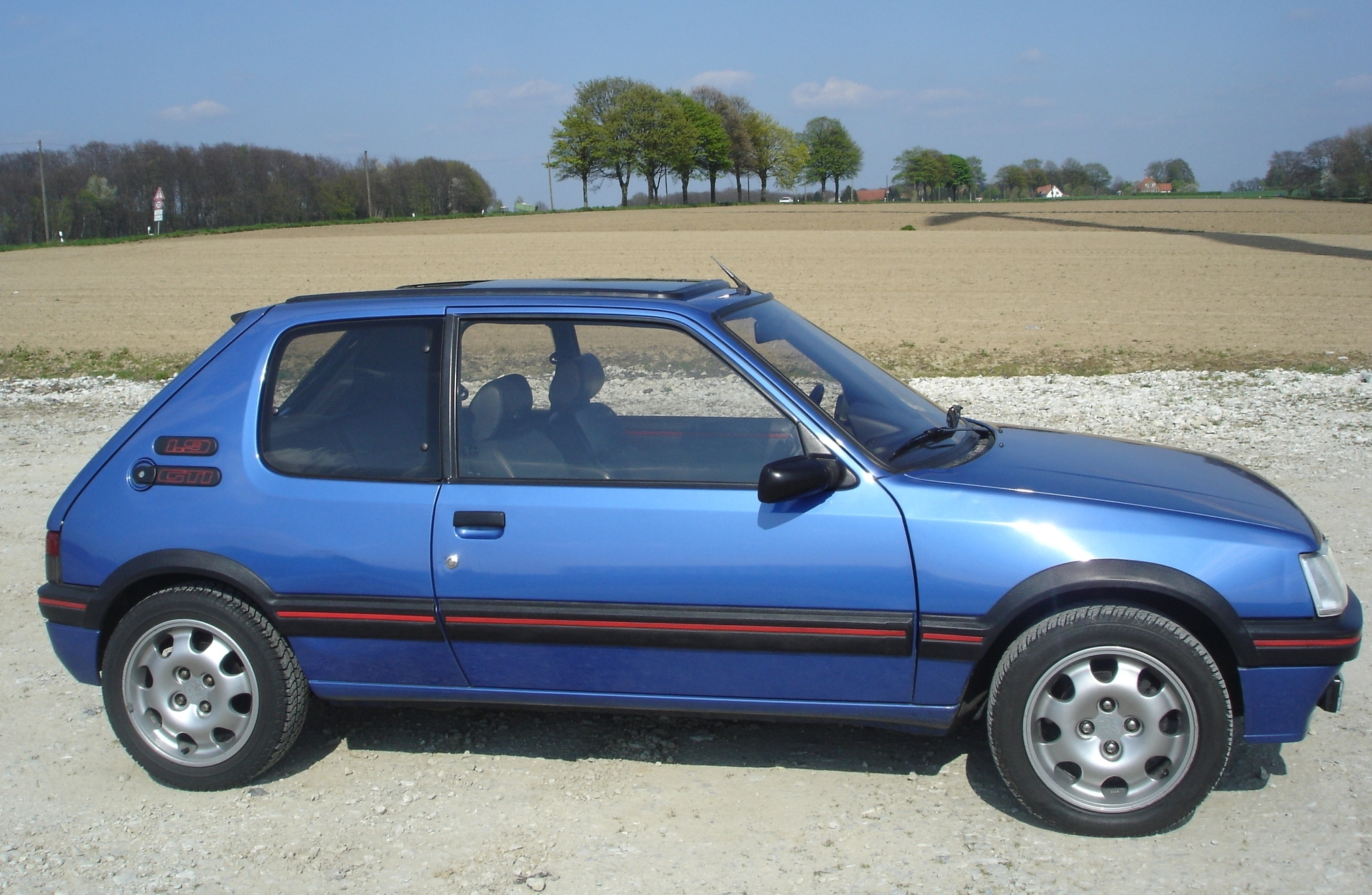 Peugeot 205 GTI 1.9l, 120 PS (mit Kat), Baujahr 1993, Kilometerstand bei dieser Aufnahme: 40.000km